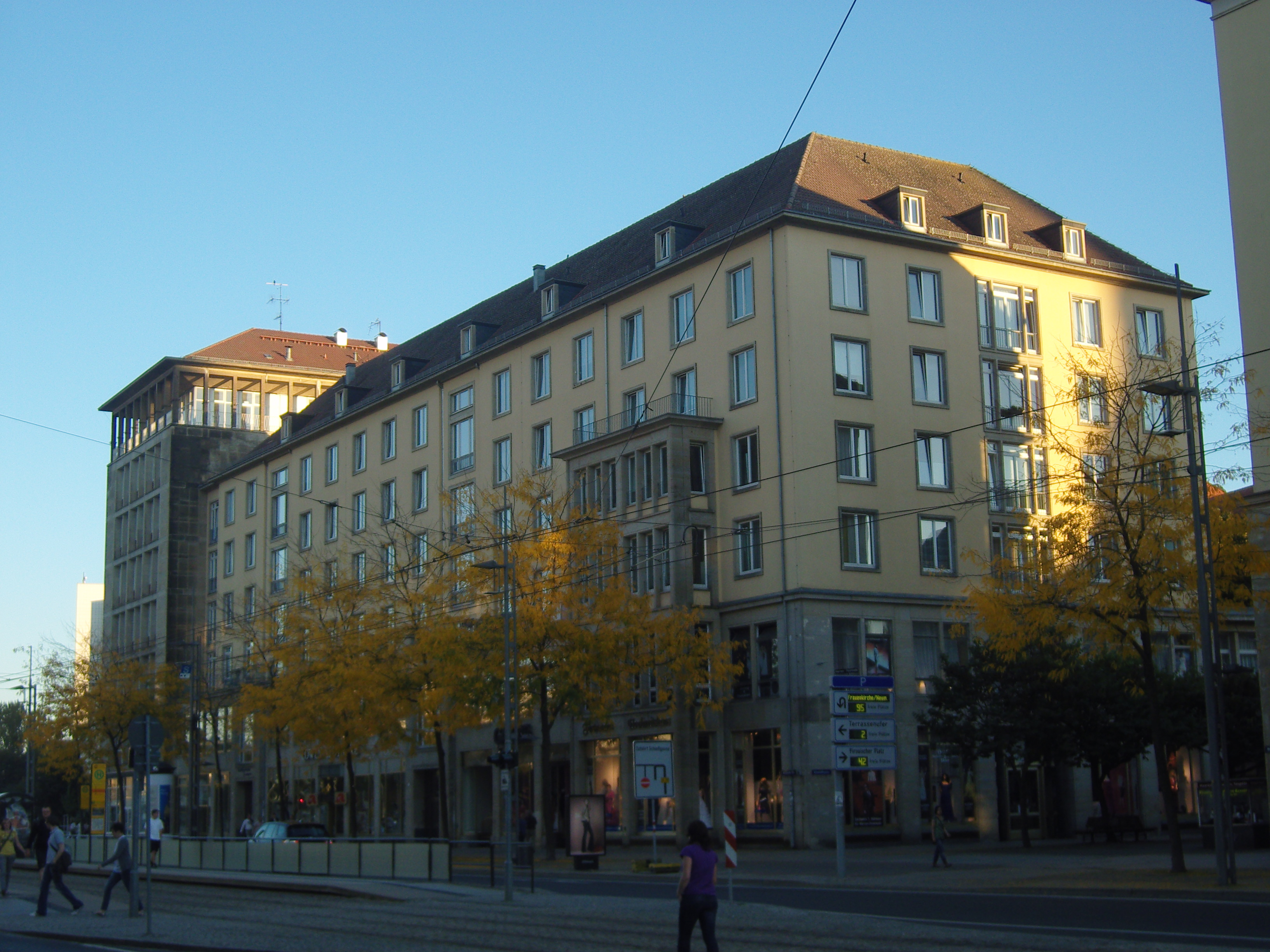 Denkmalgeschütztes Wohnhaus in der Wilsdruffer Straße 3 bis 7 in Dresden